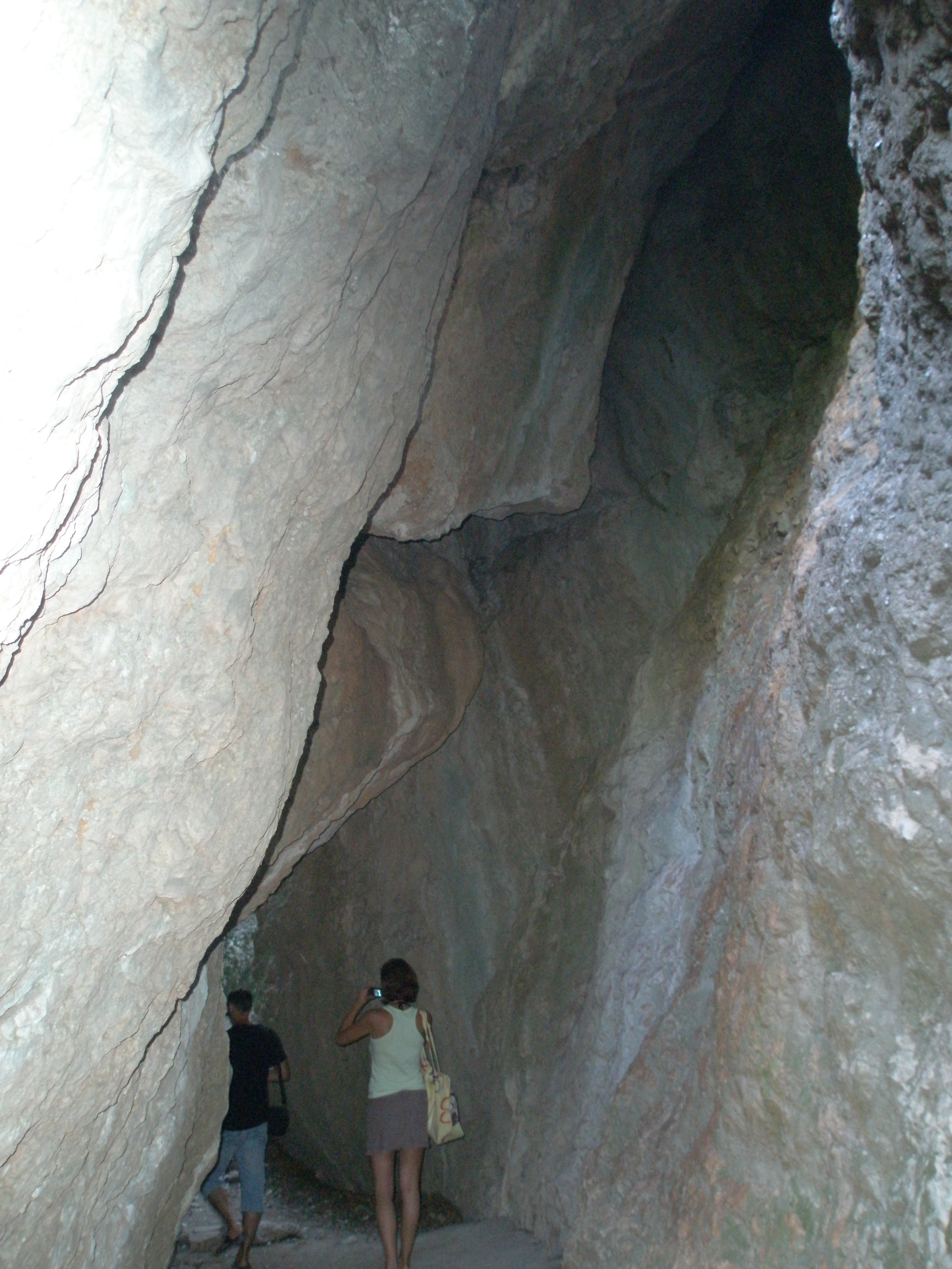 Крим пещера